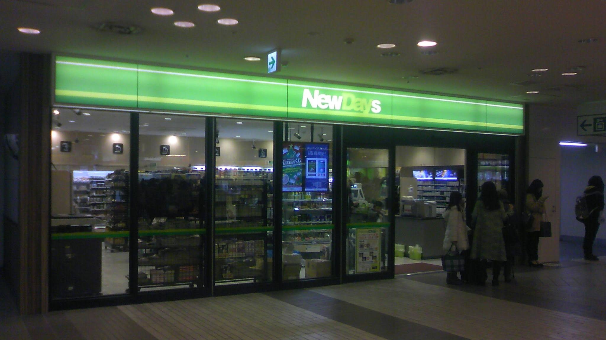 NEWDAYSミニ 仙台10号店